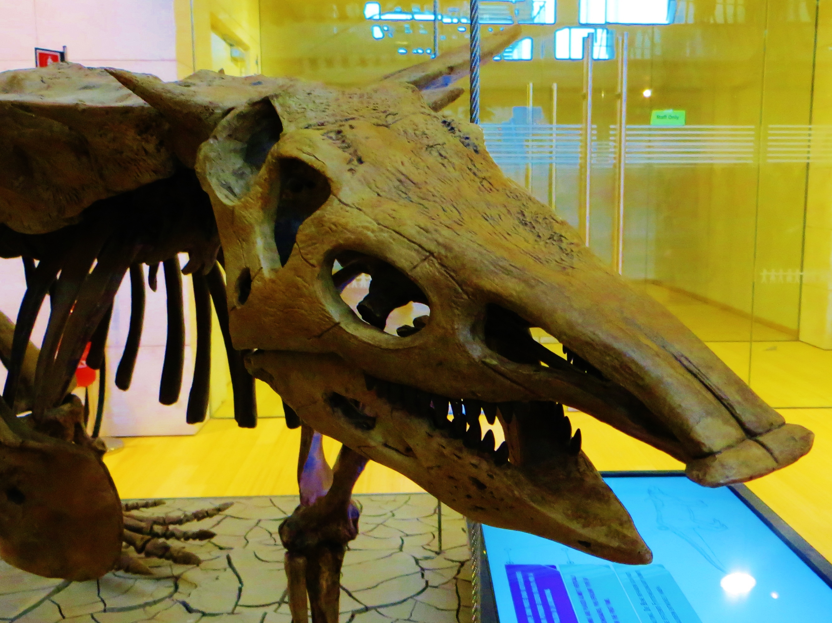 Fossil of Desmatosuchus, an extinct reptile- Took the picture at Muse (Trento)